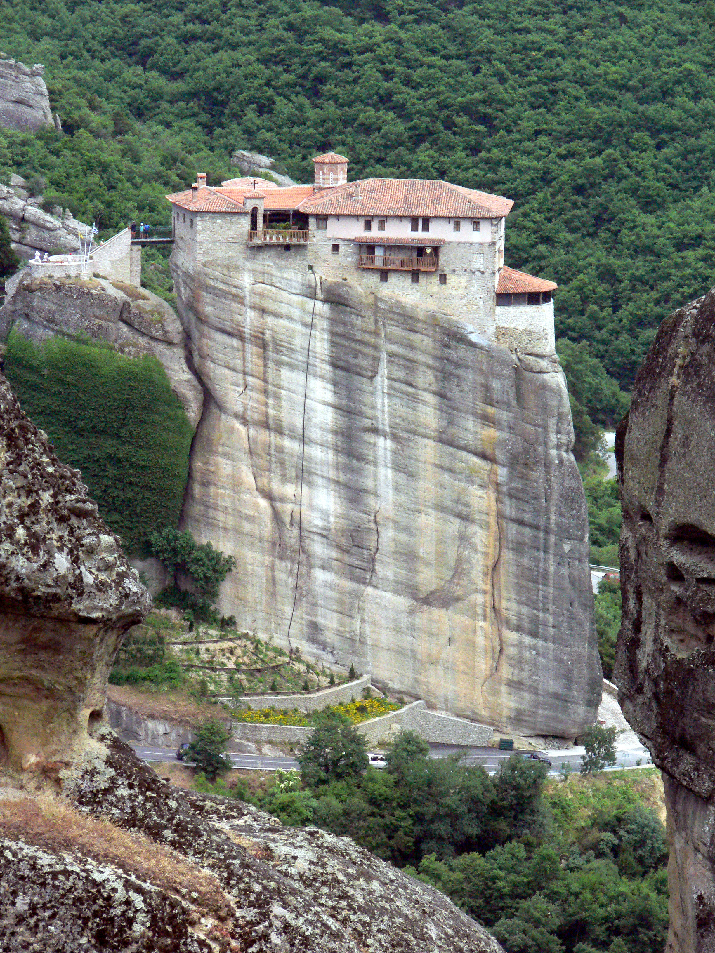 Meteora: Kloster der Dreieinigkeit.